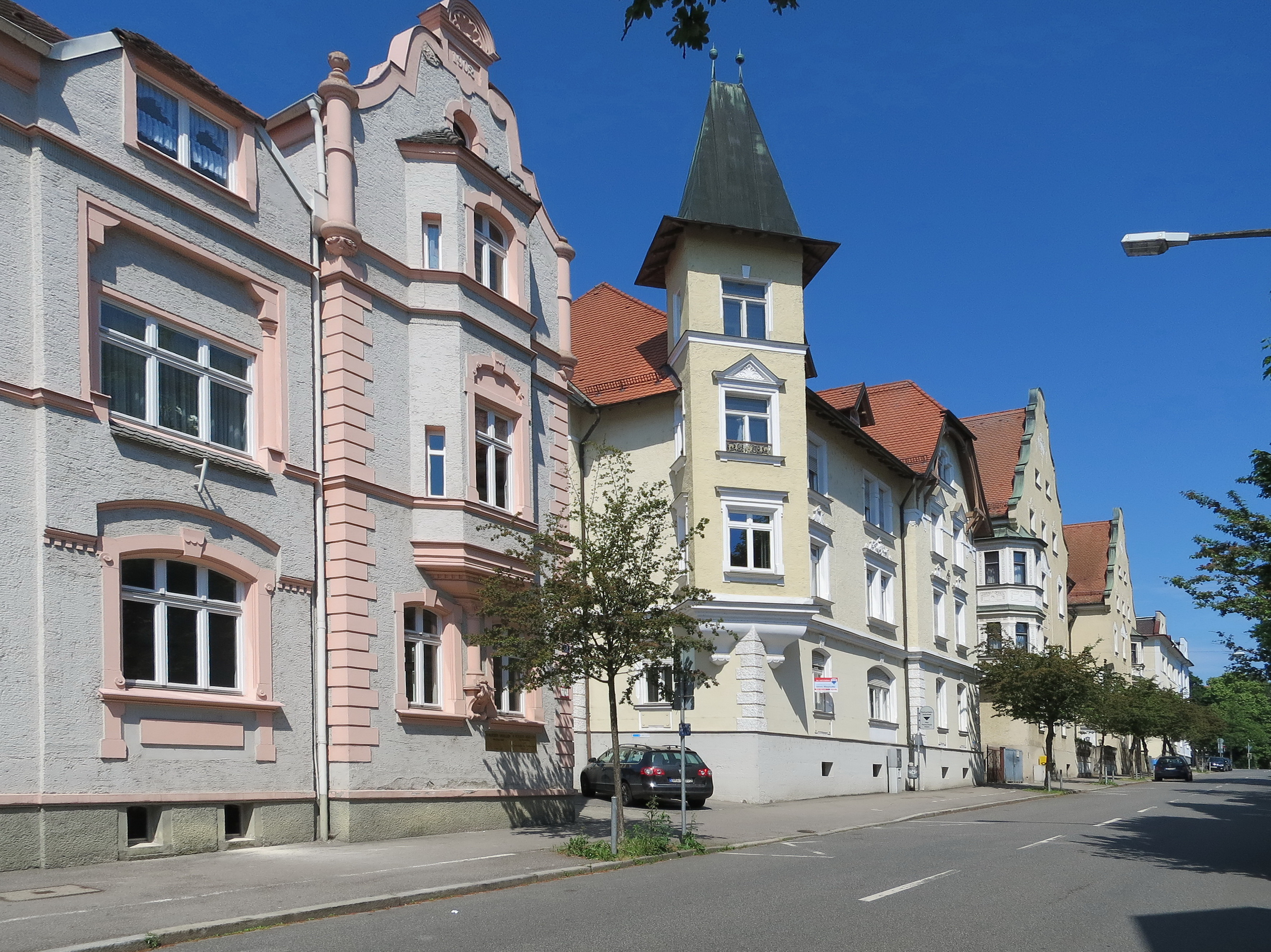 Ensemble Wittelsbacherstraße Der Blick von Süden in die Wittelbacherstraße zeigt einen Teil des denkmalgeschützten Ensembles mit der Denkmalnummer E-2-63-000-2. Es wird folgendermaßen beschrieben: Das Ensemble umfasst einen um 1900 angelegten und bebauten Straßenzug, der am südlichen Stadtgraben ansetzt und südlich bis zur Bachstraße verläuft. Seine Gebäude, in offener Bauweise errichtet, sind reich in den Formen des Historismus gegliederte und geschmückte villenartige Mietshäuser, die durch ihre Giebelrisalite, Zwerchhäuser und Erkertürme höher erscheinen als sie mit ihren zwei oder drei Geschossen sind und die von zwei monumentalen Bauten, dem Marieninstitut und der Synagoge überragt und beherrscht werden.